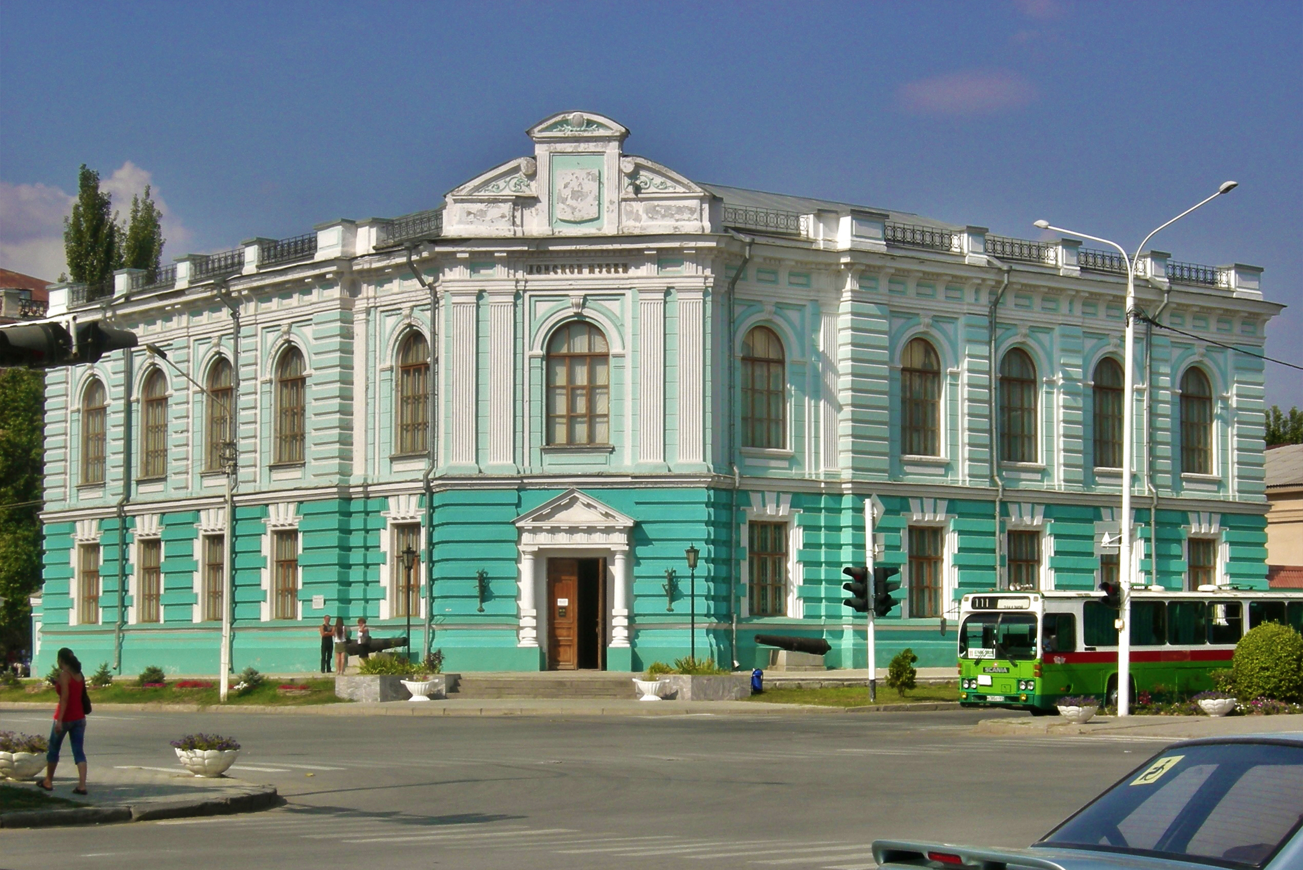 Изображение | Описание = Музей истории Донского казачества | Автор = Путилин Денис | Время создания = 30 августа 2007 | Источник =